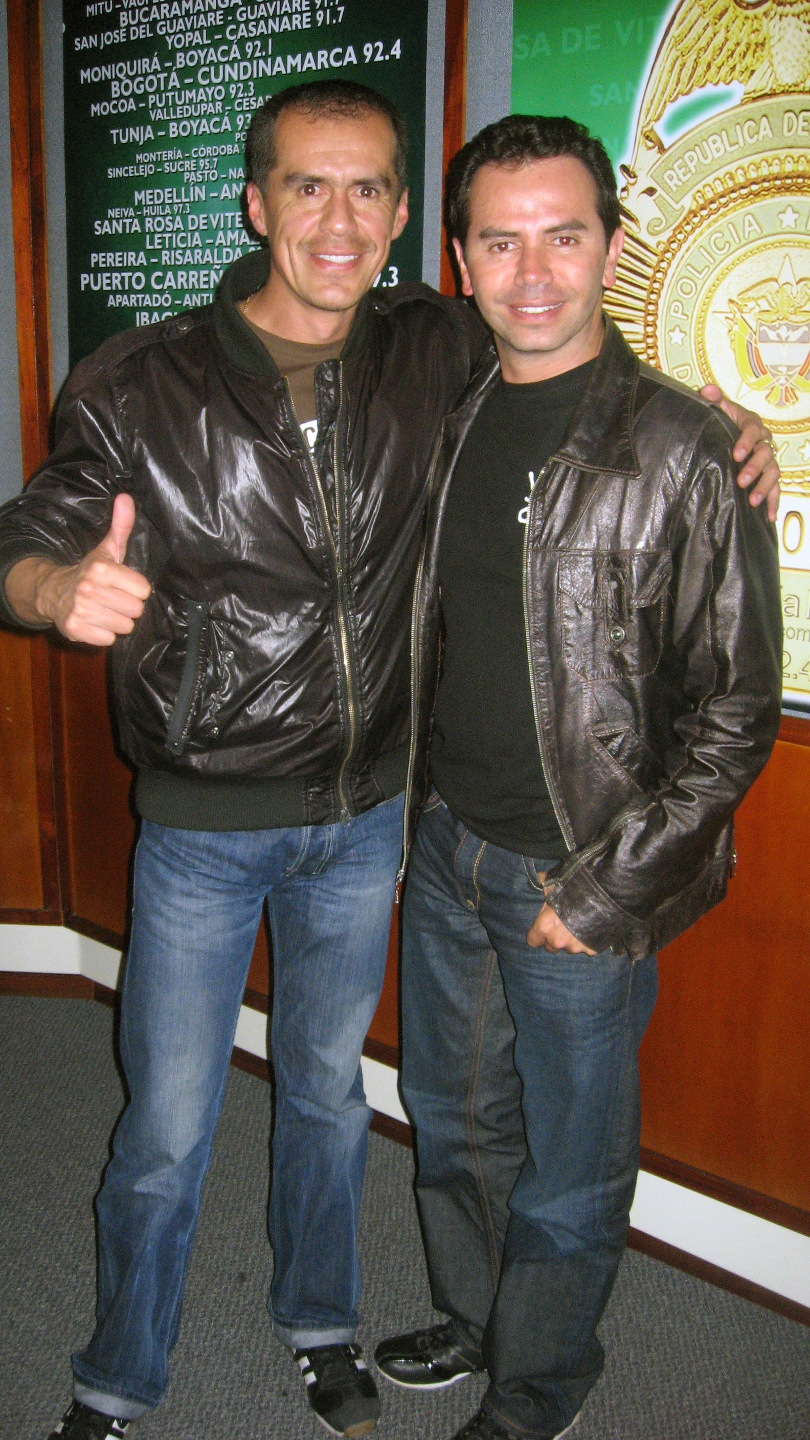 Jhonny Rivera- Emisora Policía Nacional de Colombia 92.4fm